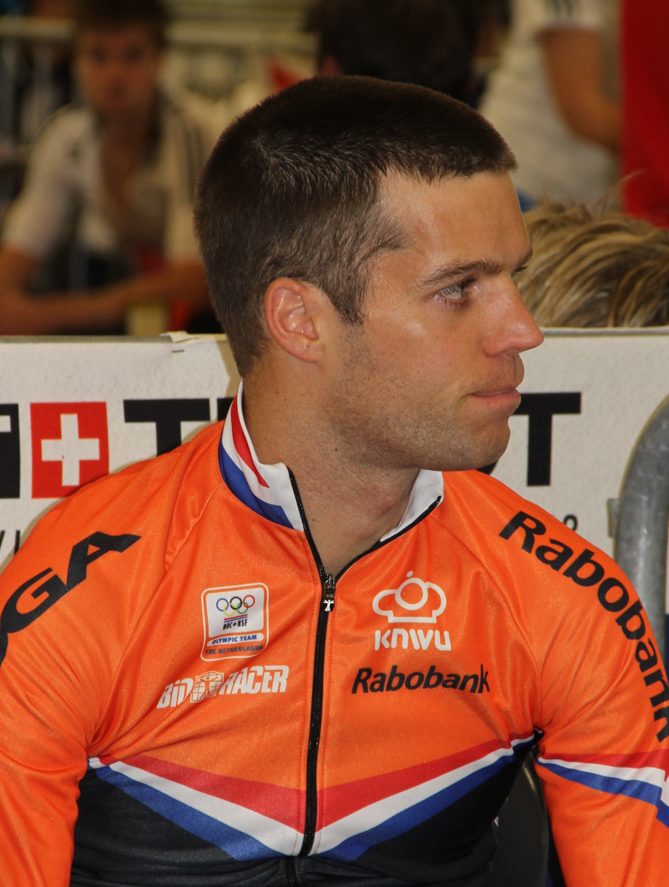 Tim Veldt, niederländischer Radsportler The making of this document was supported by the Community-Budget of Wikimedia Germany.